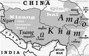 Lage der osttibetischen Regionen Amdo und Kham (Karte: A. Gruschke, Freiburg) New version File:Tibet provinces.png